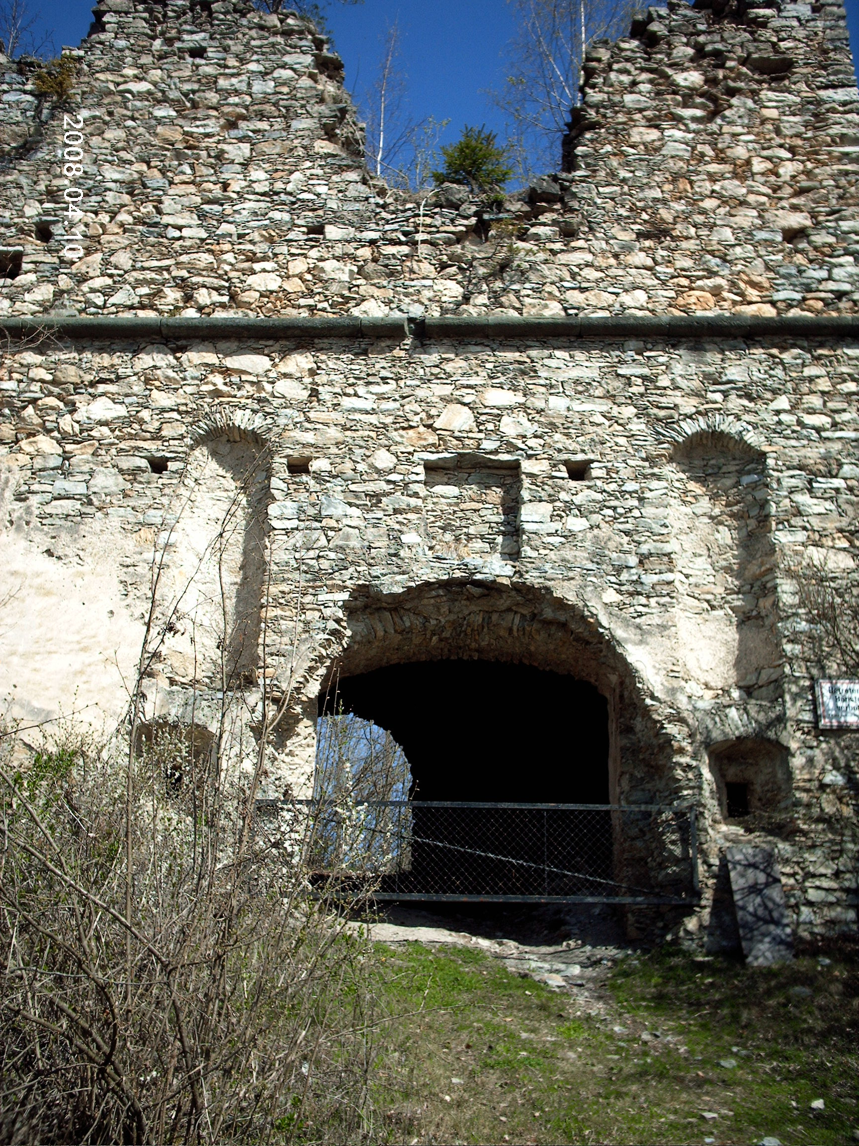 Burgruine Waisenberg - äußerer Torturm